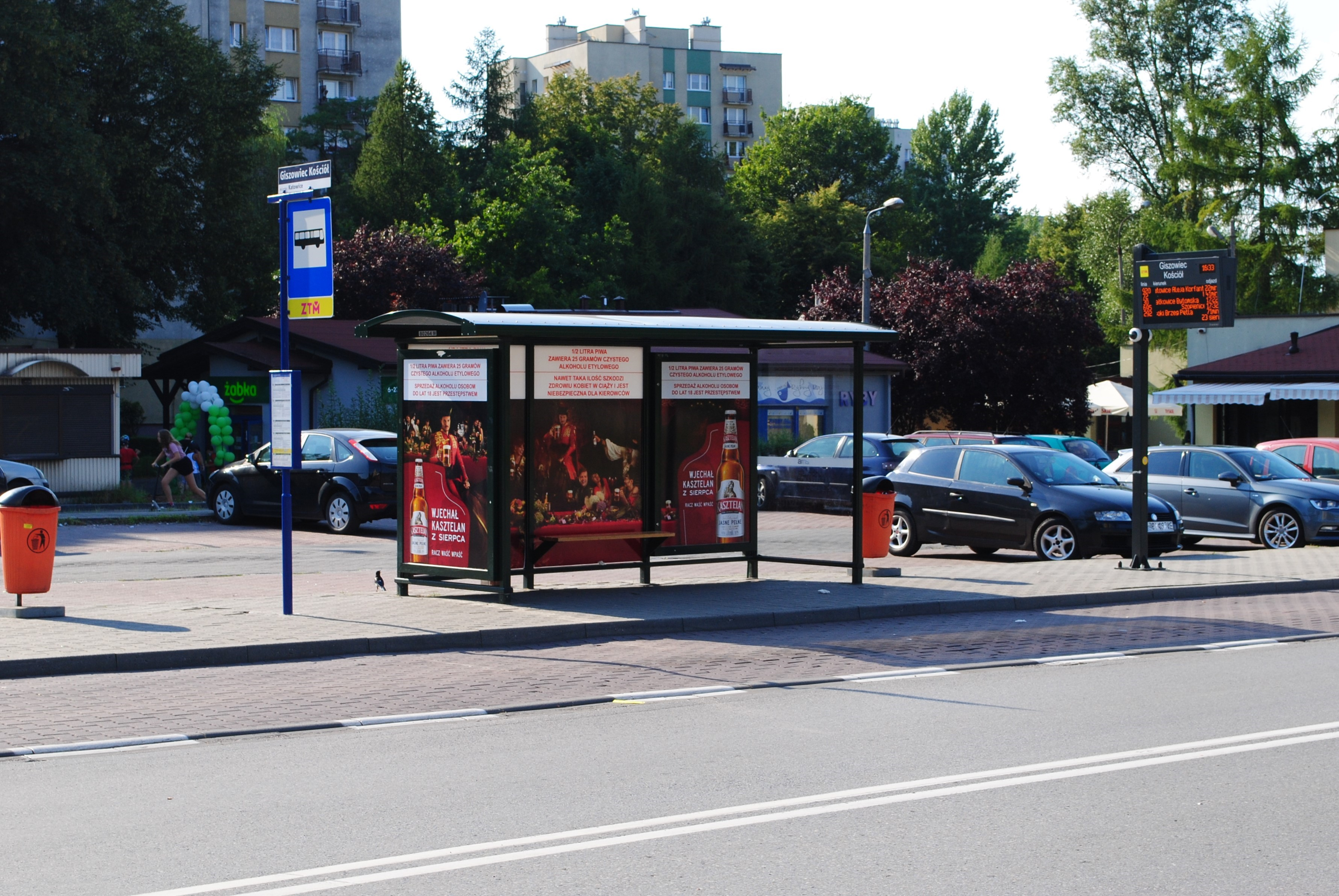 Katowice-Giszowiec. Przystanek Giszowiec Kościół